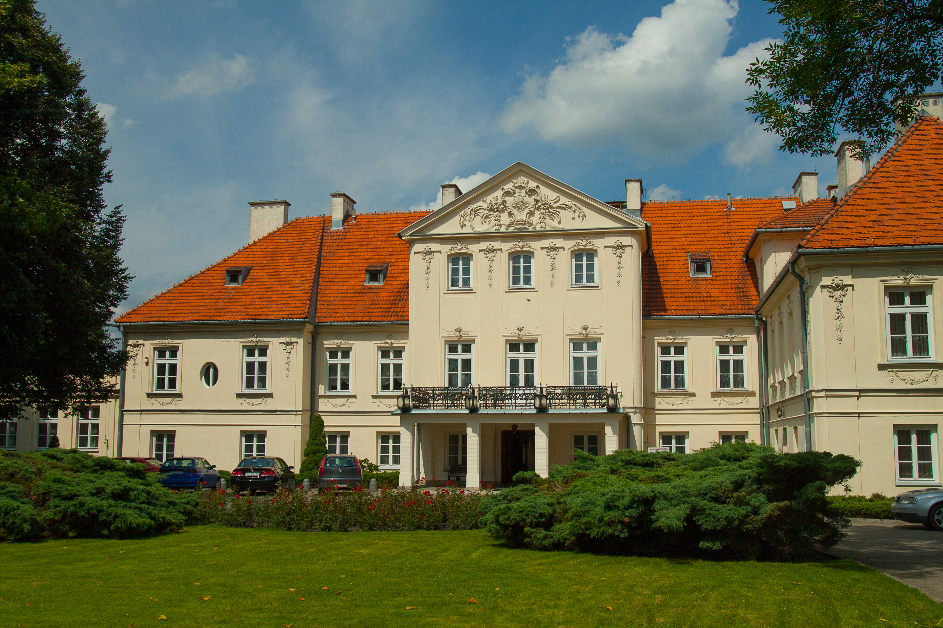 Leszno, pałac, XVIII, XIX